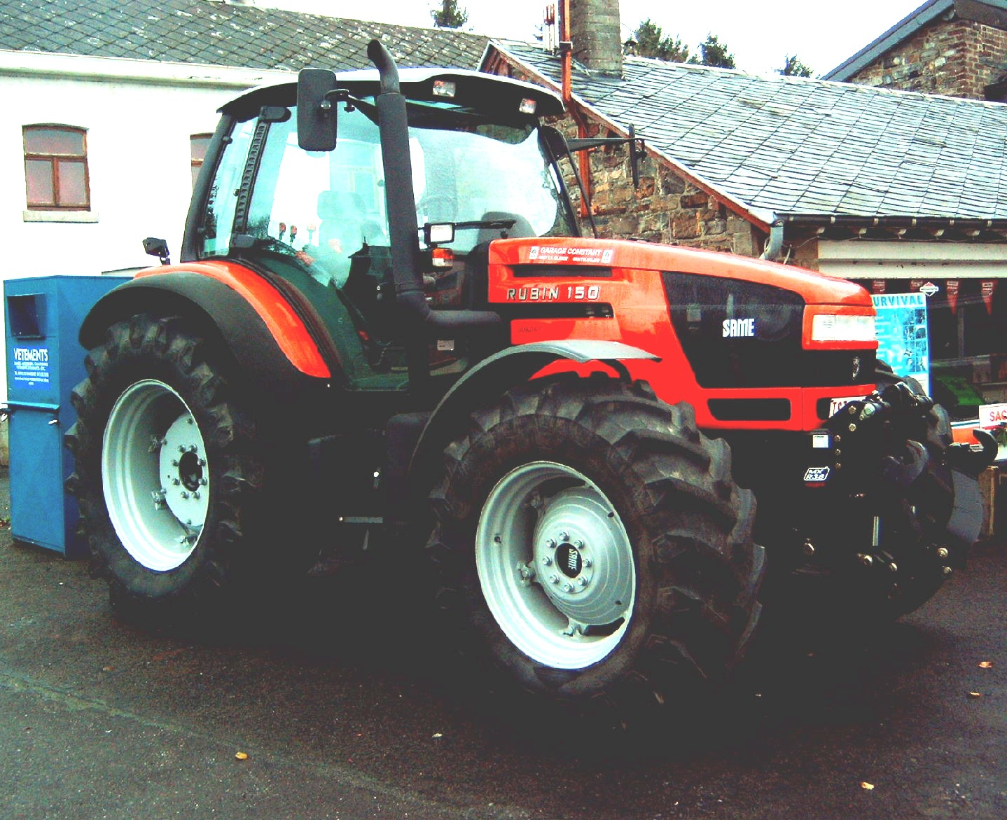 Tractor SAME Rubin 150. 12 november 2005